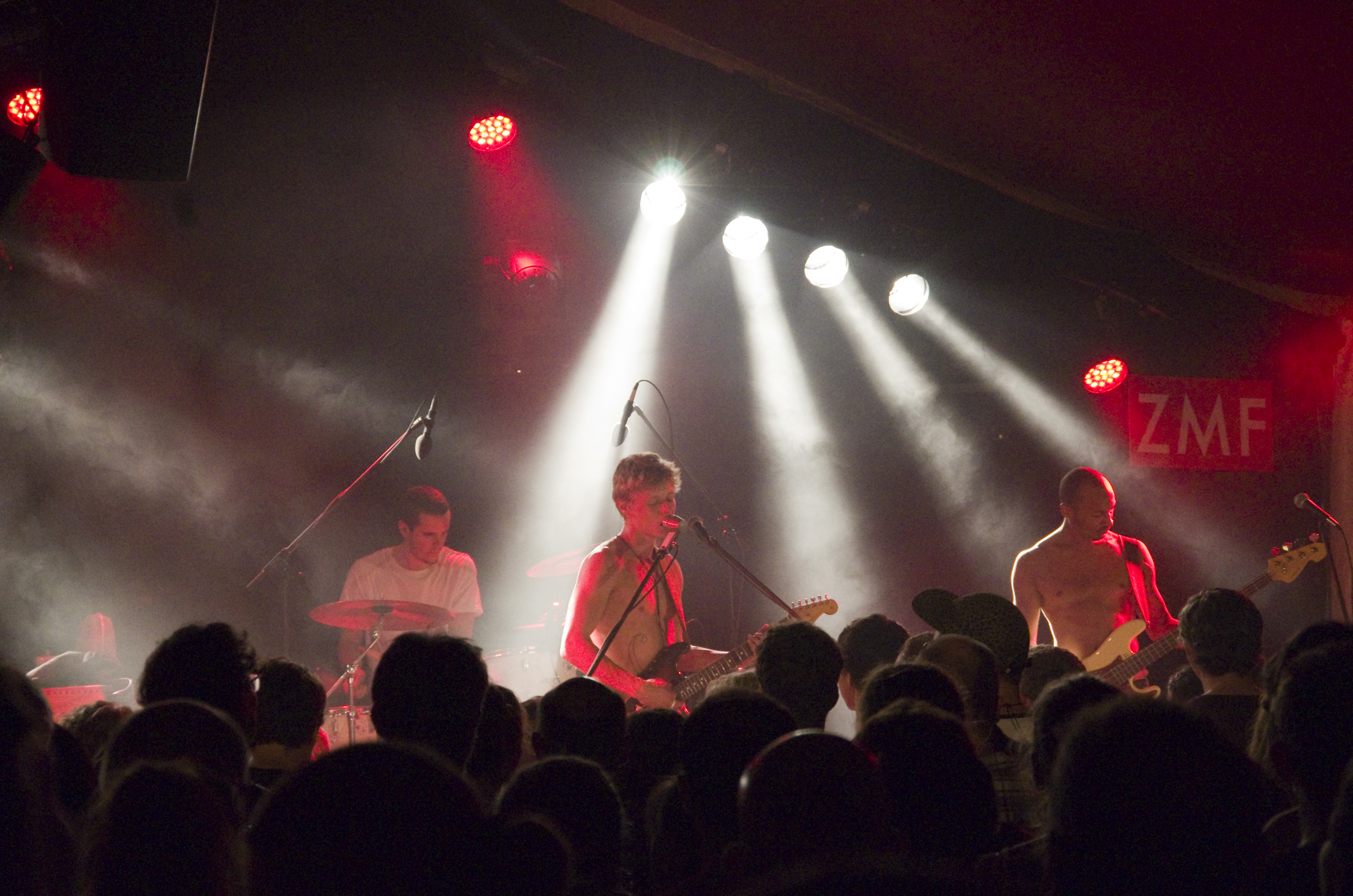 Das Zelt-Musik-Festival 2015 in Freiburg im Breisgau. 01.07.2015 Jesper Munk